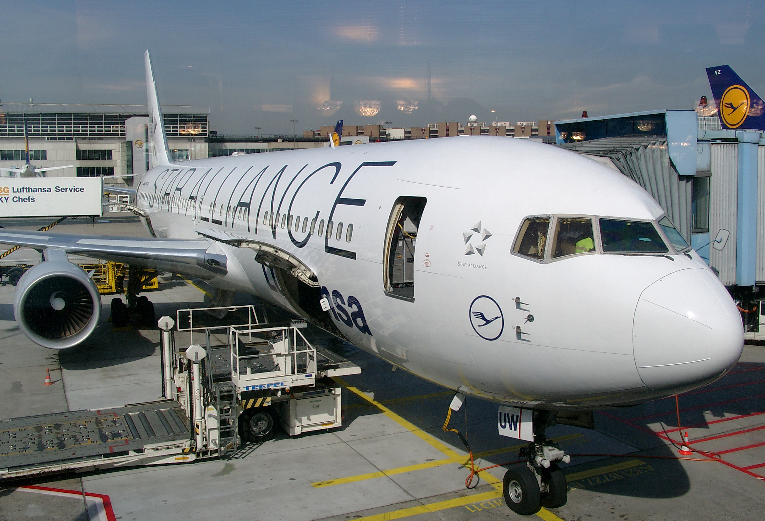 damals noch mit einer Boeing 767-3Z9/ER betrieben